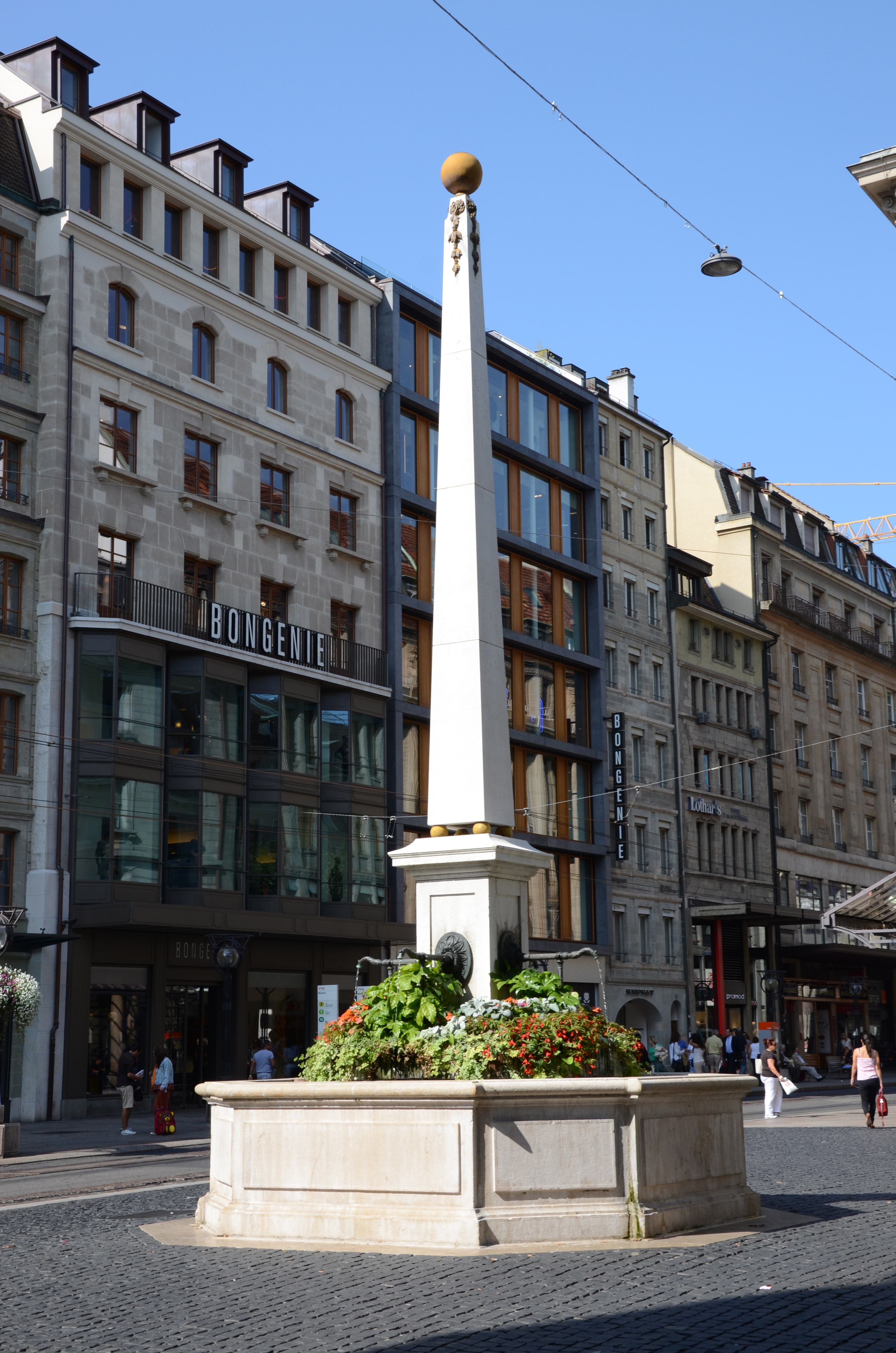 Fontaine Le Molard, Genève